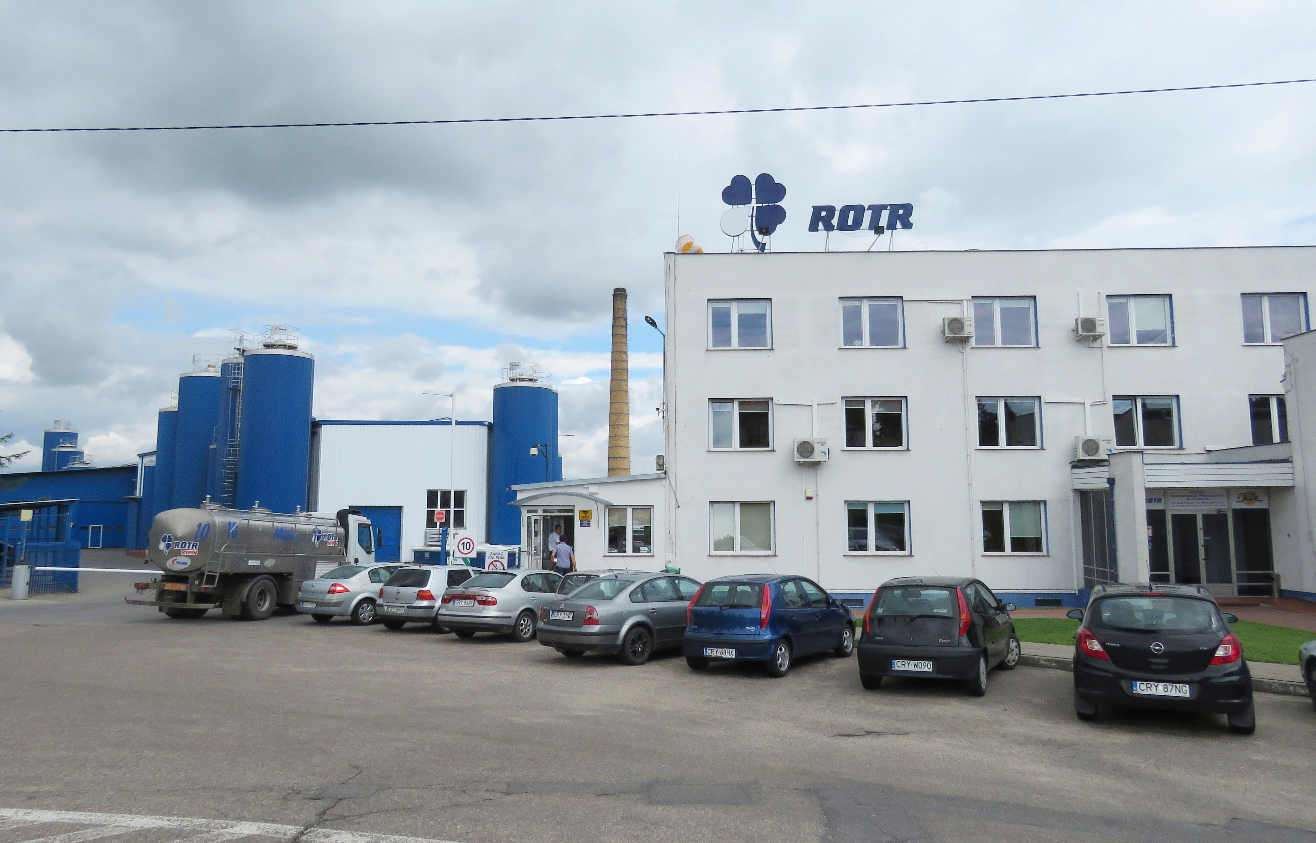 ROTR Rypin